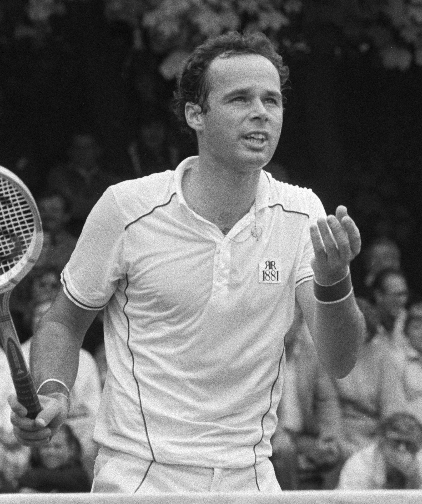 Balázs Taróczy lors de la finale à Hilversum en 1981.